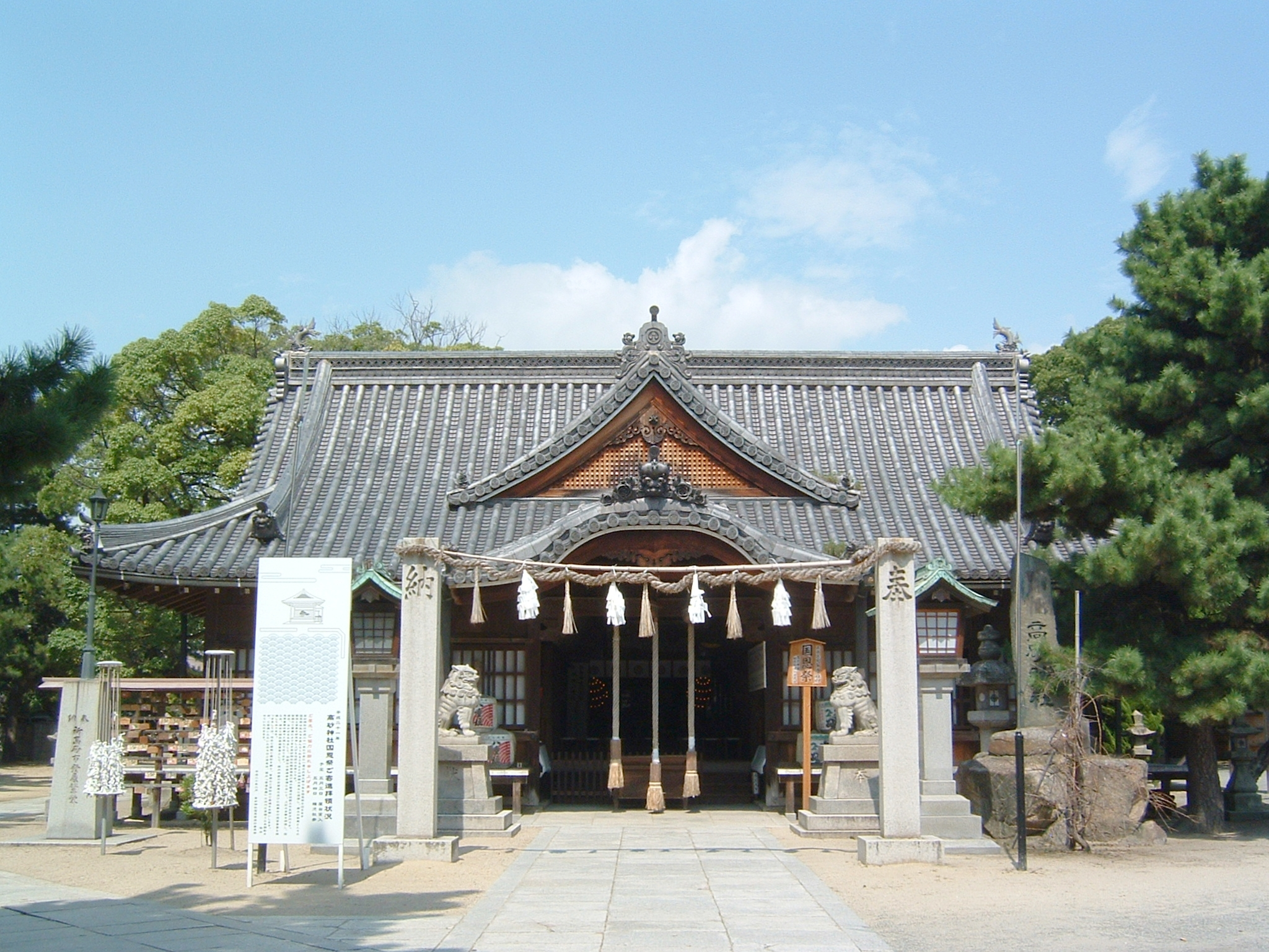 Takasago-jinja (高砂神社)